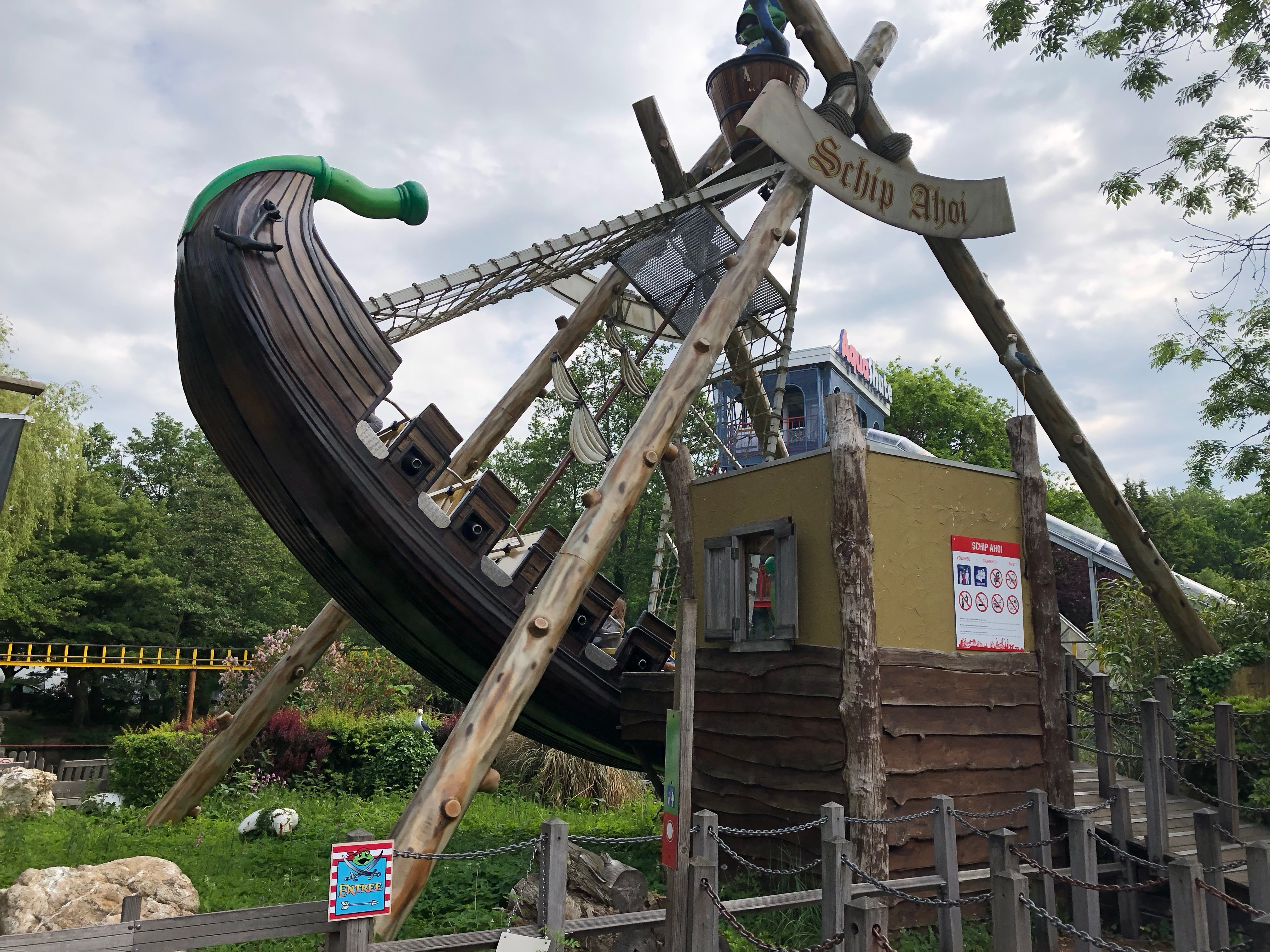 Duinrell